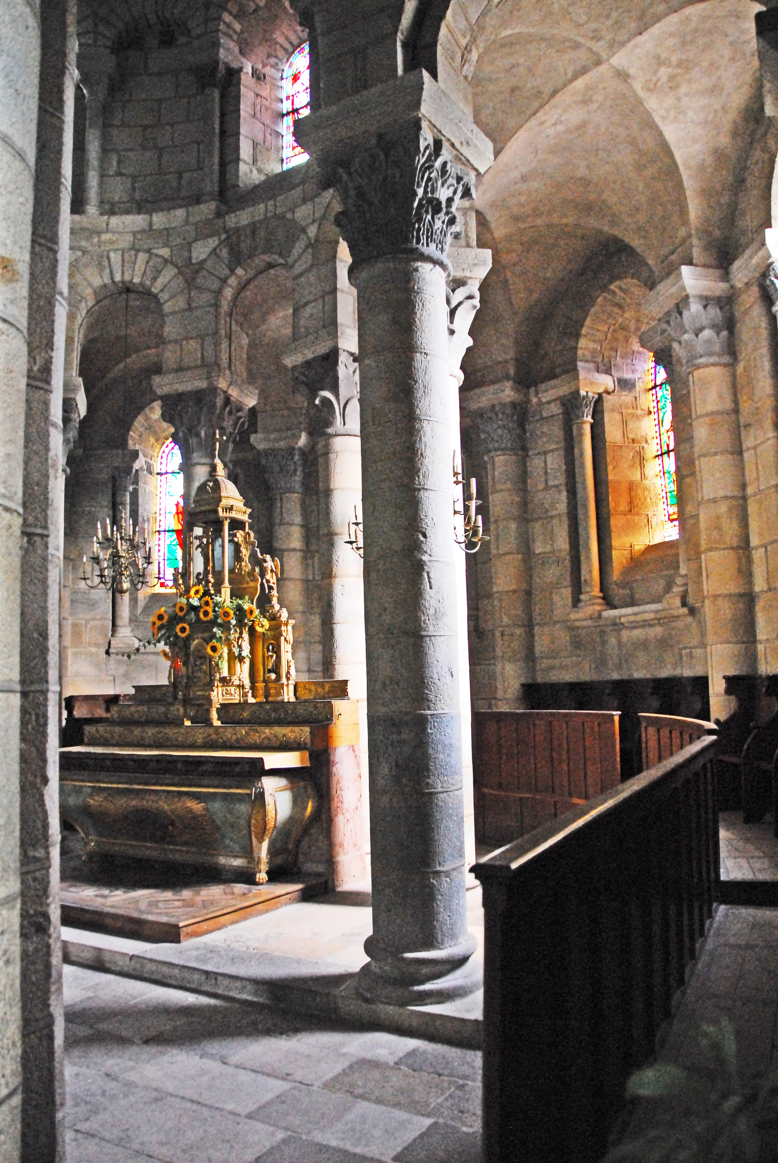 St-Saturnin (Puy-de-Dôme), südl. Chorumgang